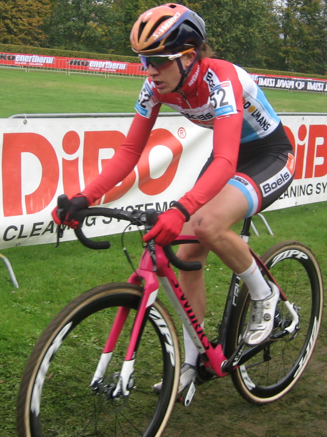 Christine Majerus (21e) in de wereldbeker veldrijden op de Cauberg in Valkenburg, Nederland, op zondag 23 oktober 2016.